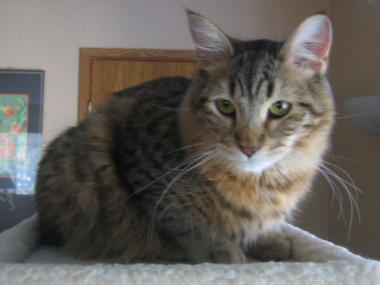 Dobby pixie-bob